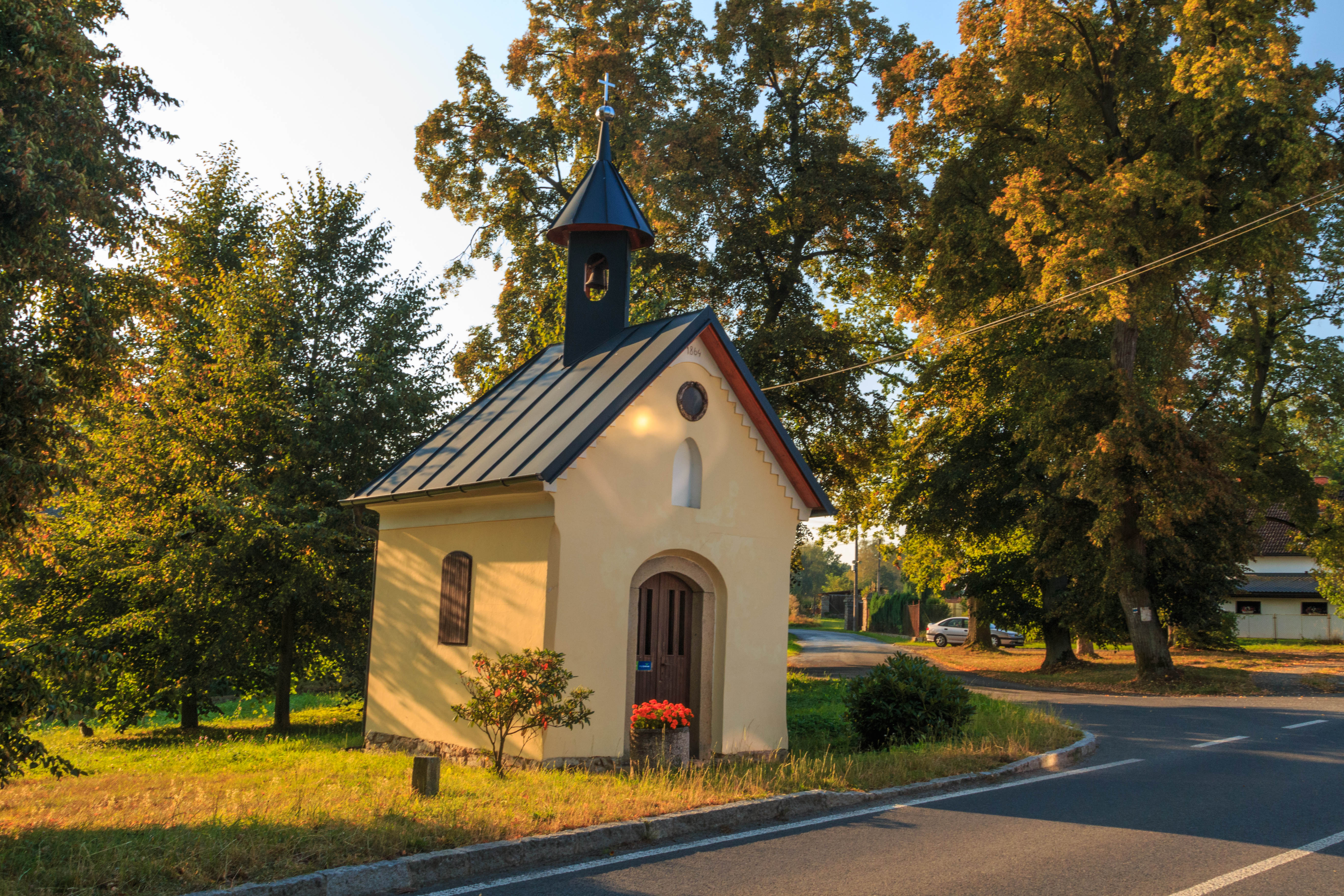 Závidkovice - kaplička